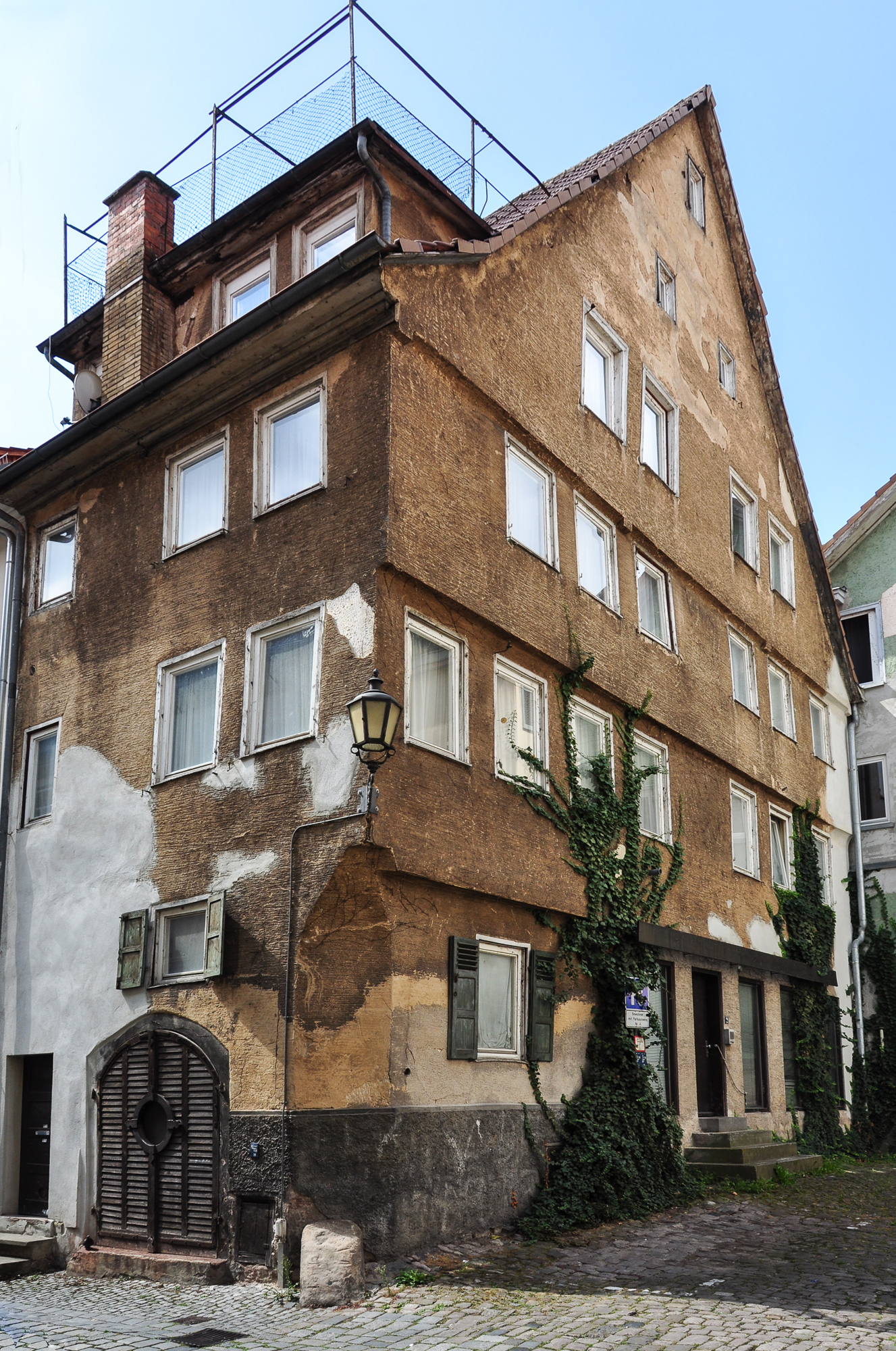 Das denkmalgeschützte Gebäude bildet die Innenecke der Apothekergasse, die hier um 90° verschwenkt. Die Altstadtsanierung ist hier noch nicht angekommen. Dadurch kann man sich aber noch an den alten Putzstrukturen erfreuen, die bei einem Neuverputz so nicht wieder herzustellen sein werden.